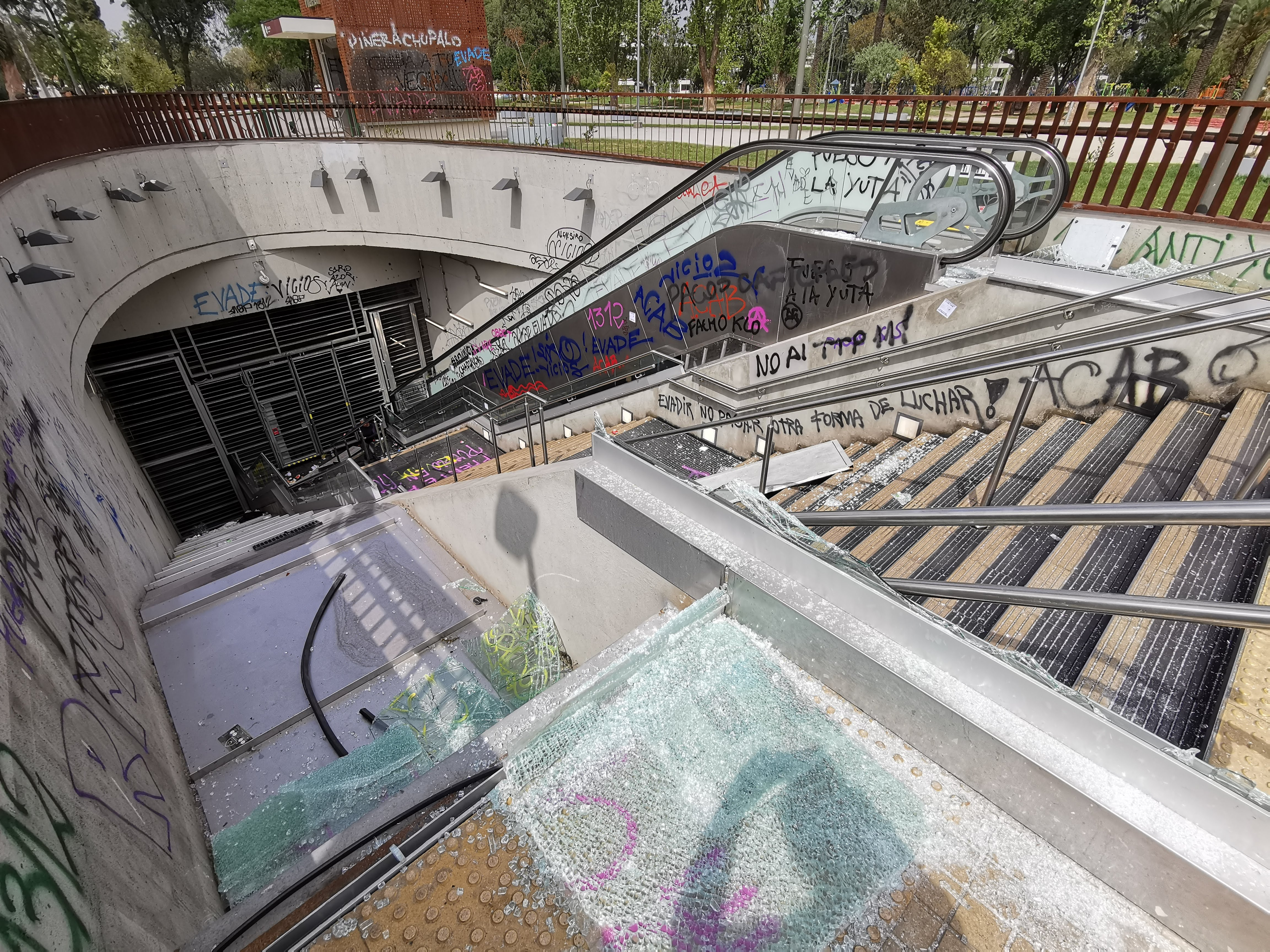 Destrozos y rayados realizados en la nueva estación de Metro "Villa Frei" de la Línea 3. La estación solo presenta daño en su exterior con vidrios quebrados, rayados y basura. El interior de la estación se encuentra intacto.